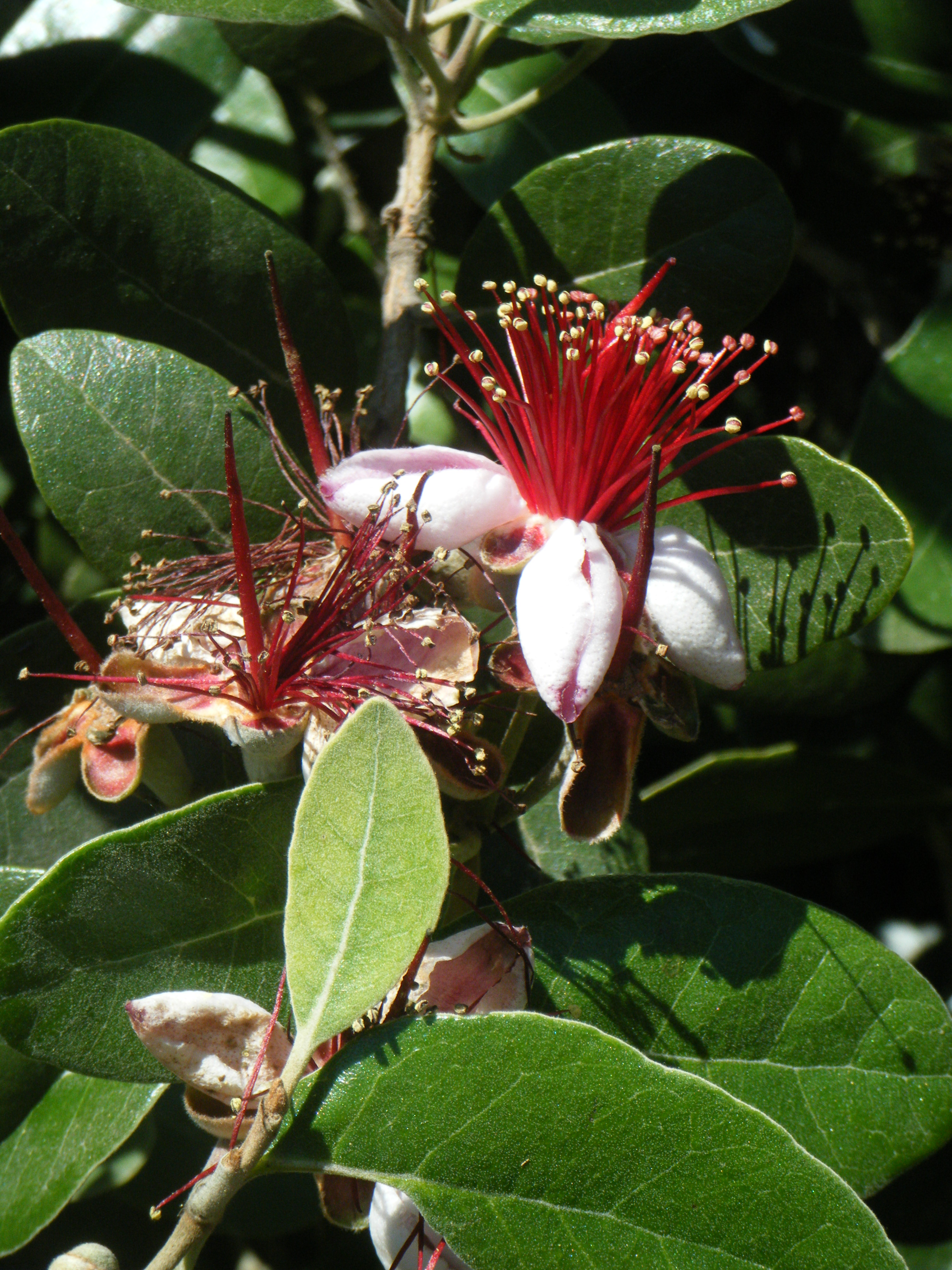 Feijoa sellowiana in fiore